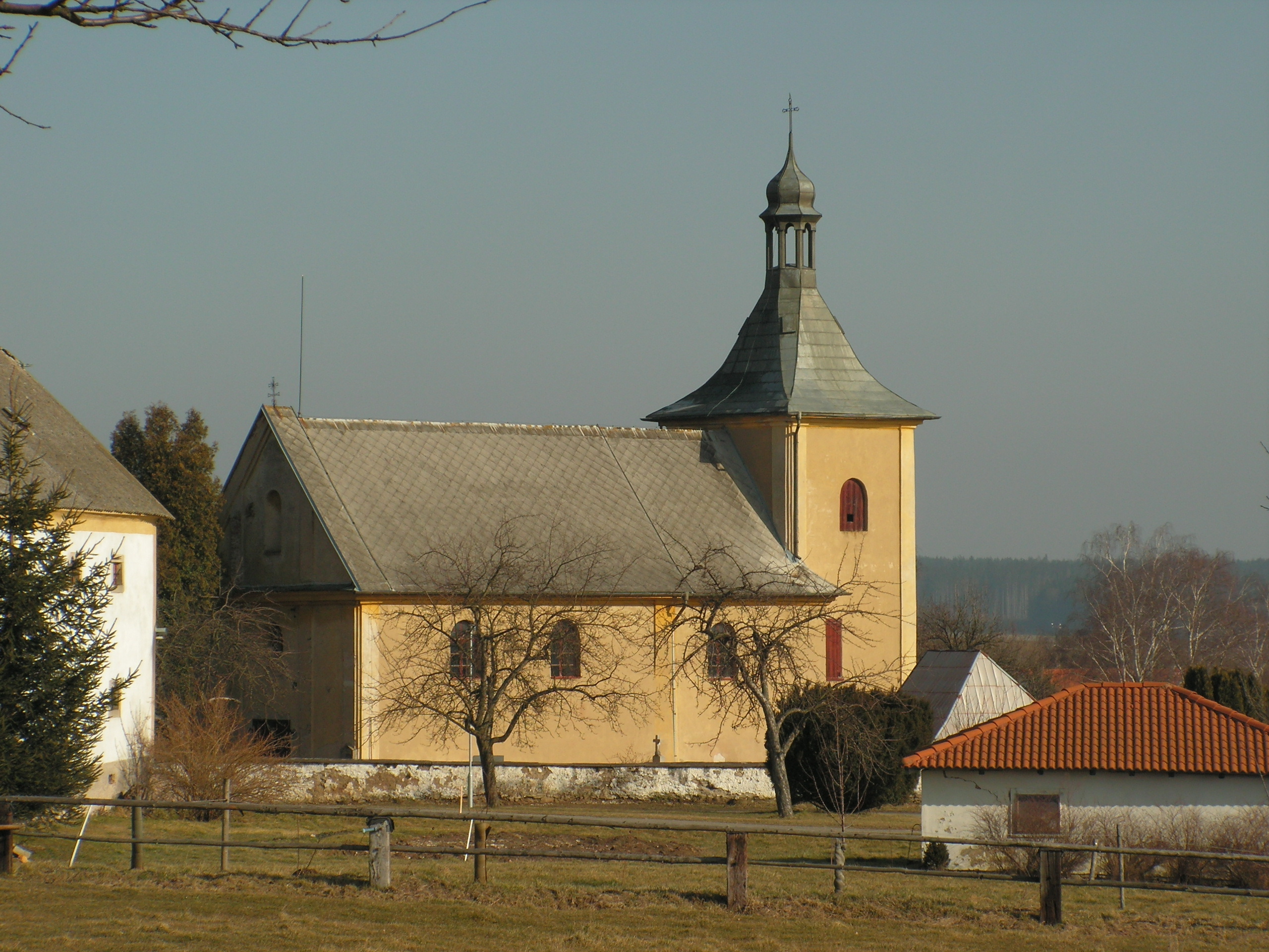 Hřbitovní kostel sv. Kříže ve vsi Dobrnice (součást obce Leština u Světlé v kraji Vysočina)